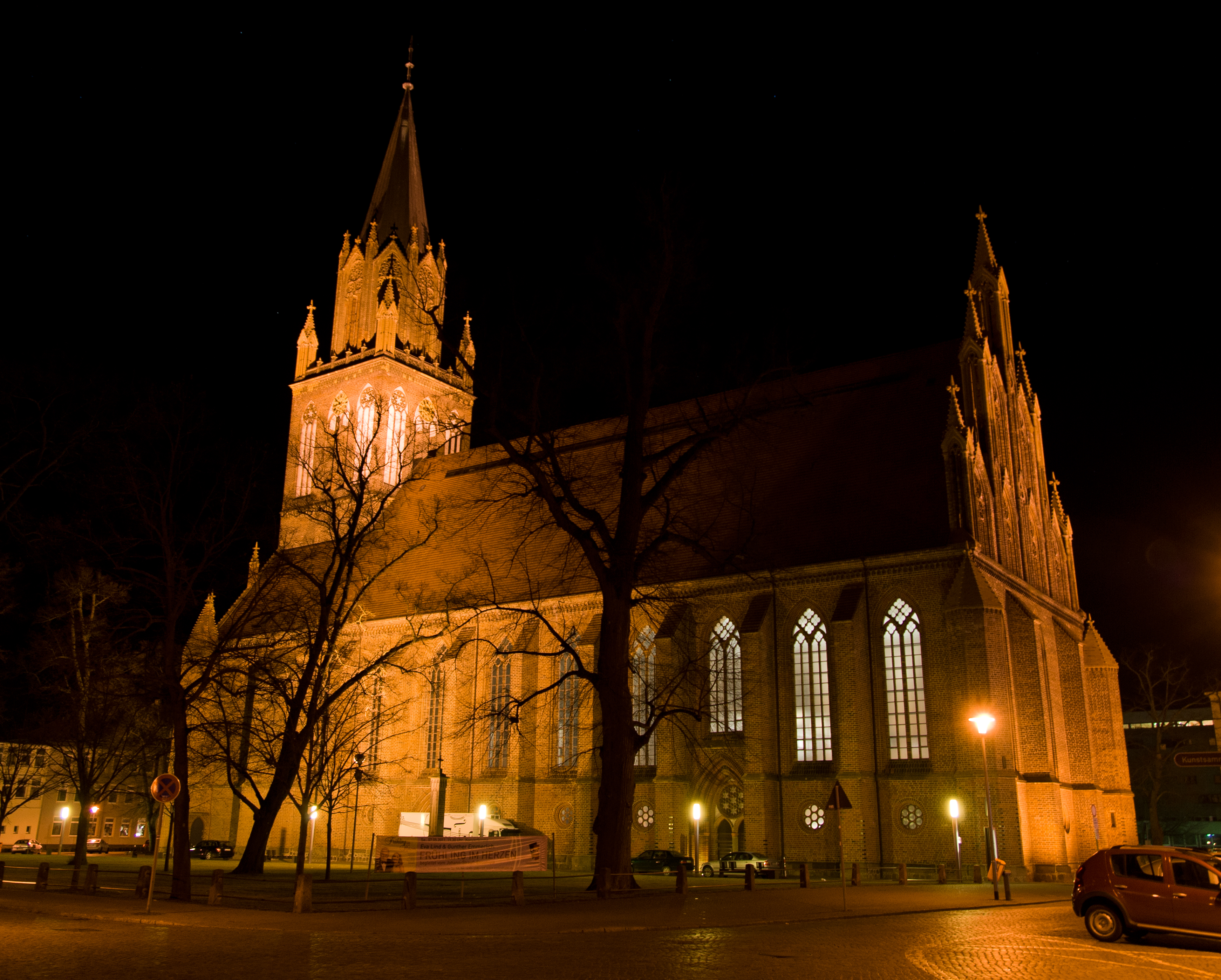 Marienkirche , Neubrandenburg/Innenstadt, An der Marienkirche, Denkmalnummer 6